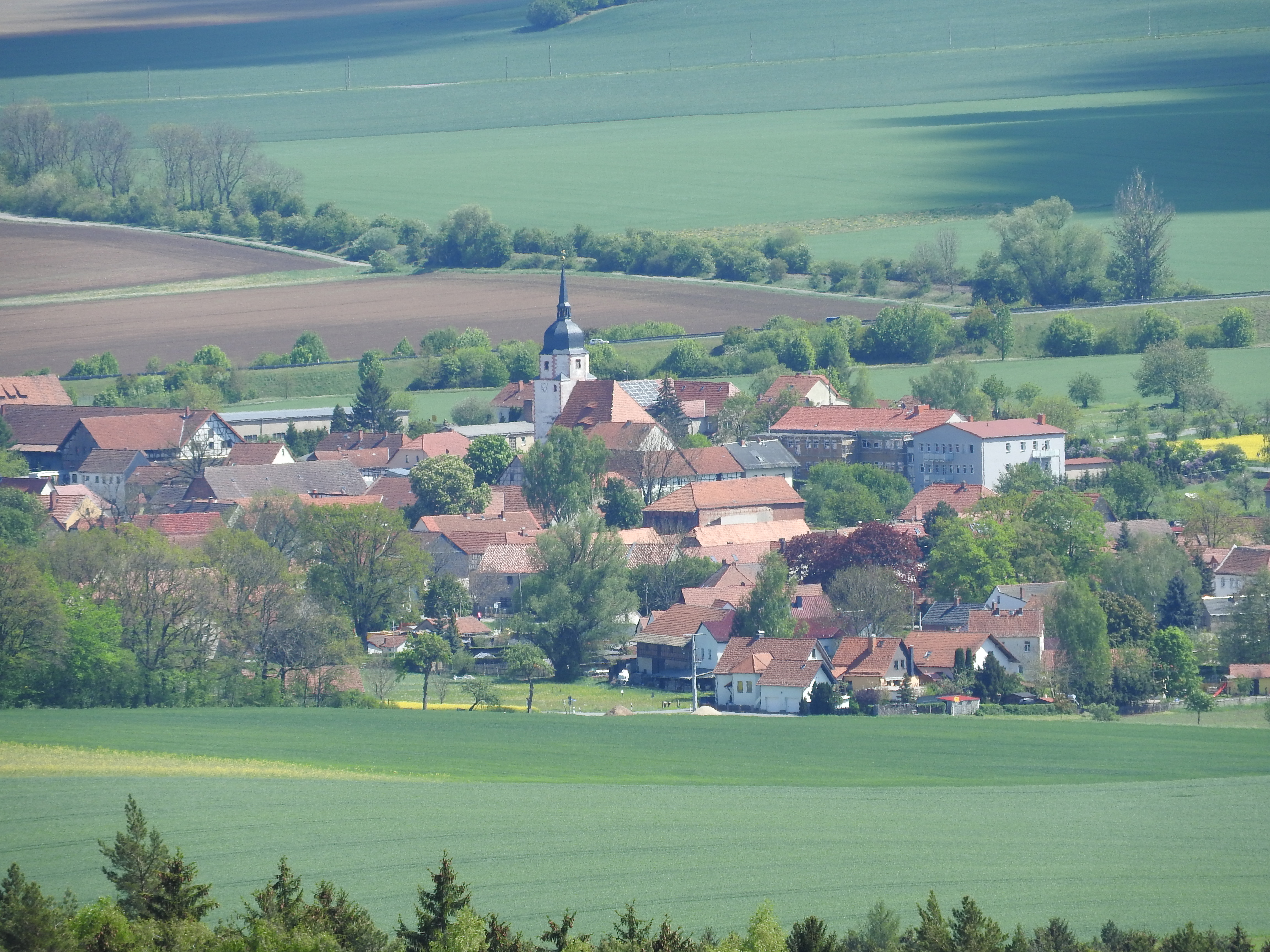 Blick auf Dreitzsch vom Bismarckturm bei Neustadt an der Orla in Thüringen